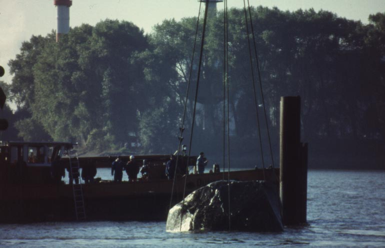 1. Bergungsversuch des Findlings Alter Schwede am 18. Oktober 1999